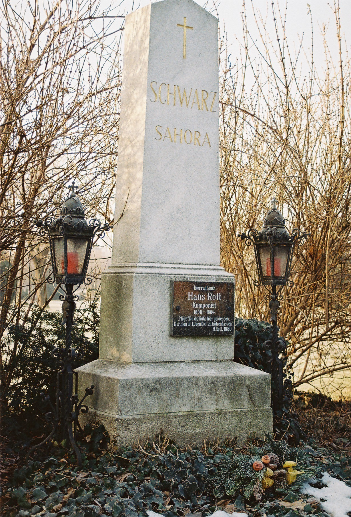 Grabstelle von Hans Rott; Zentralfriedhof in Wien Gruppe 23 Reihe 2 Nr. 59; aufgenommen im Dezember 2010